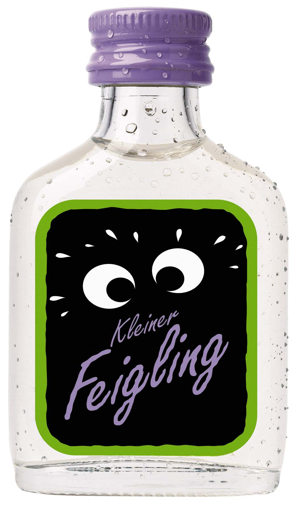 Kleiner Feigling Flasche aus der Produktion der Waldemar Behn GmbH